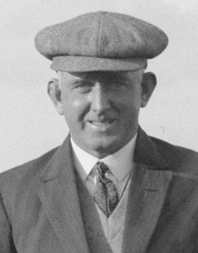 Uitsnede van Herbert "John" Leavey, Engels voetballer en voetbaltrainer.